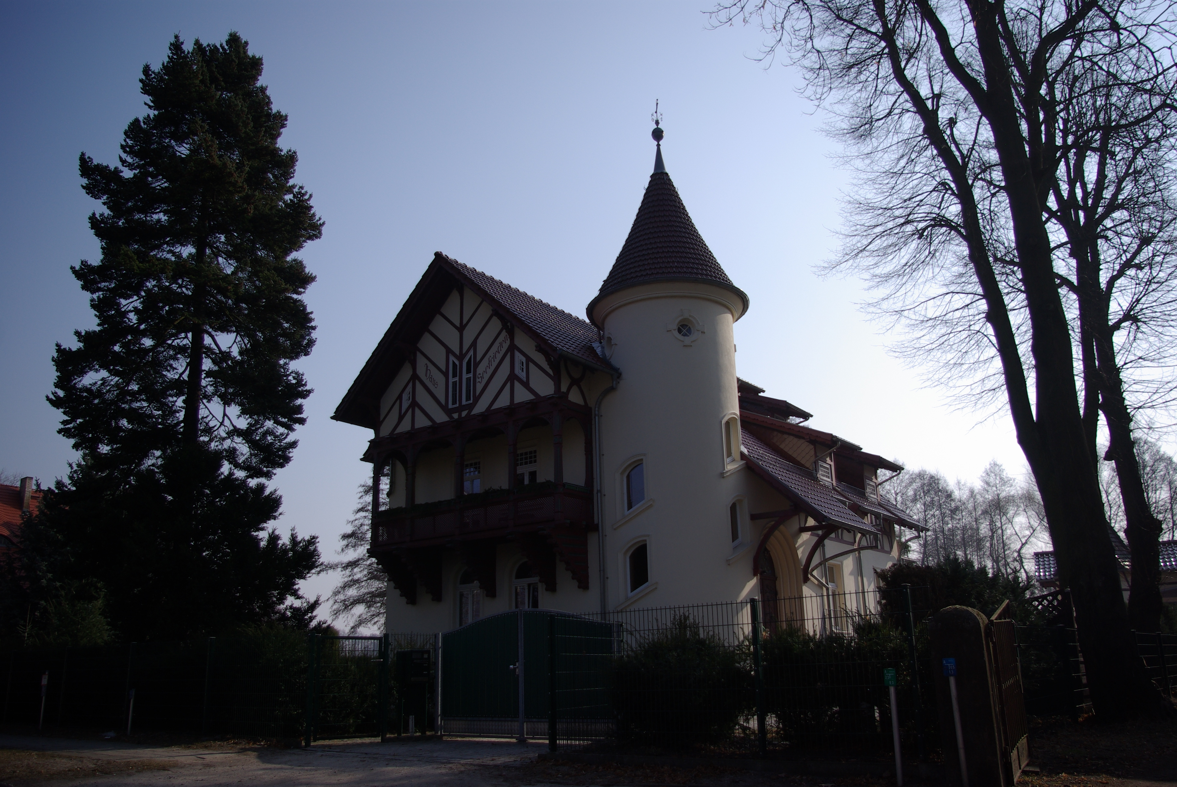 Am Mellensee in Brandenburg. Die Villa Seefrieden wurde um das Jahr 1910 erbaut. Die Villa ist im Heimatstil erbaut worden. Sie steht Bahnhofsstraße 12, und steht unter Denkmalschutz.